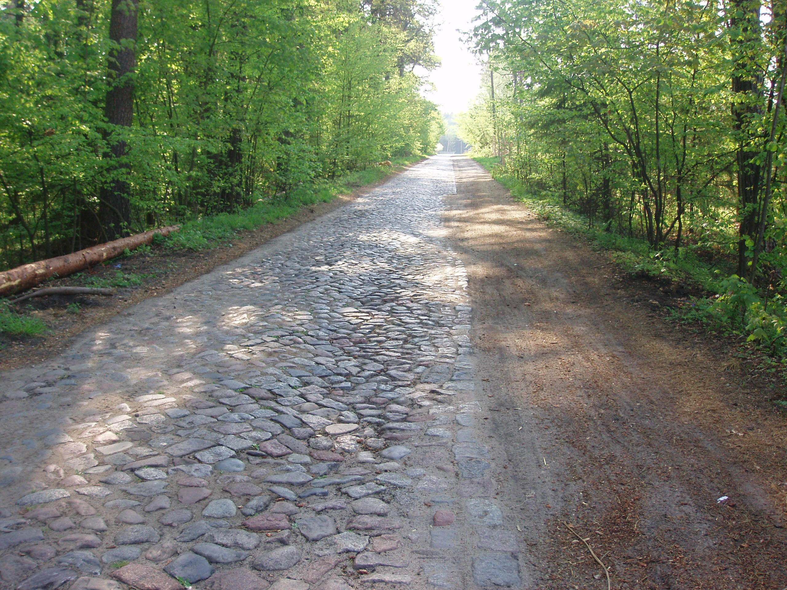 Brukowana droga, do Nowej Wsi